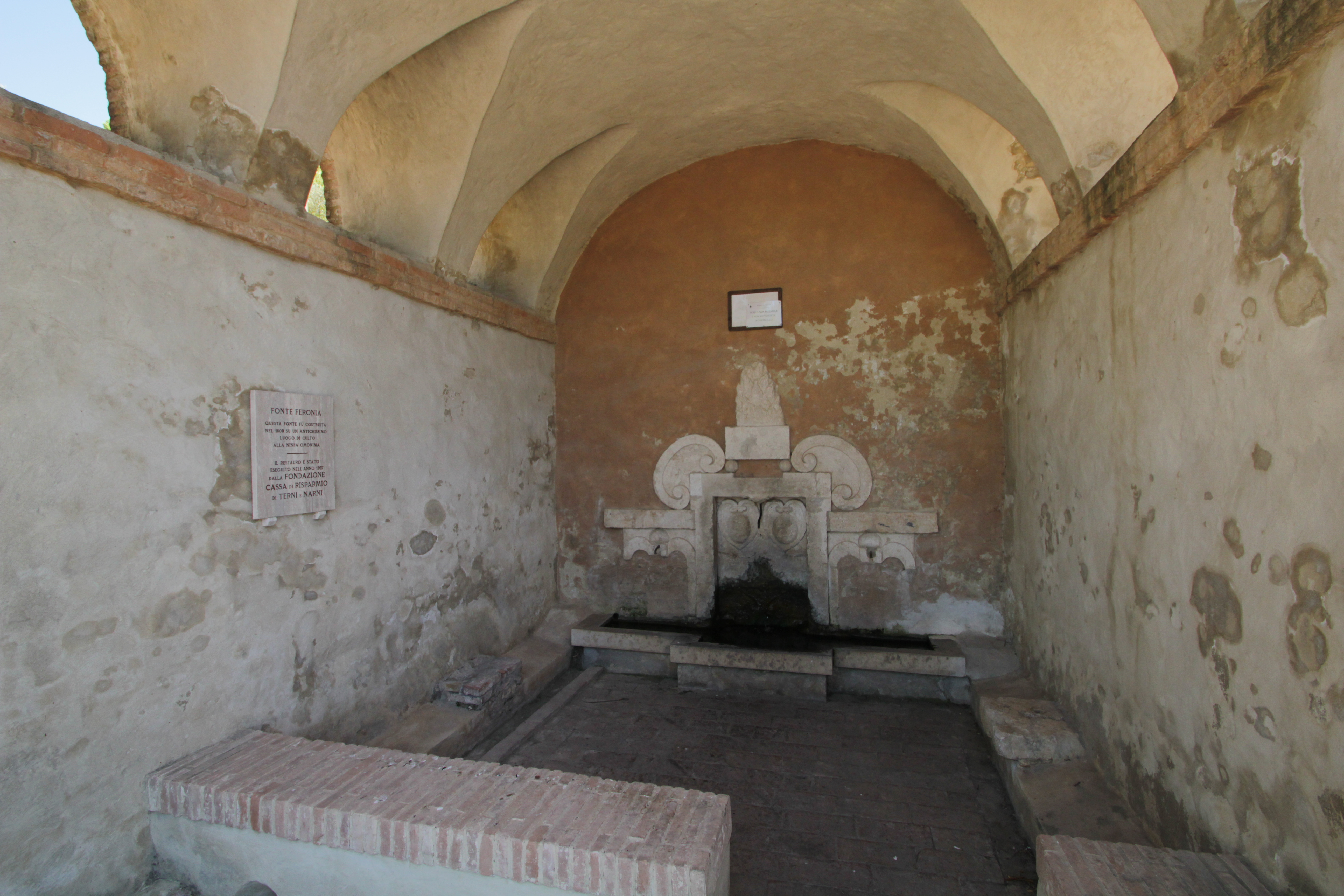 Interno della fonte di Feronia a Narni, Terni, Umbria.